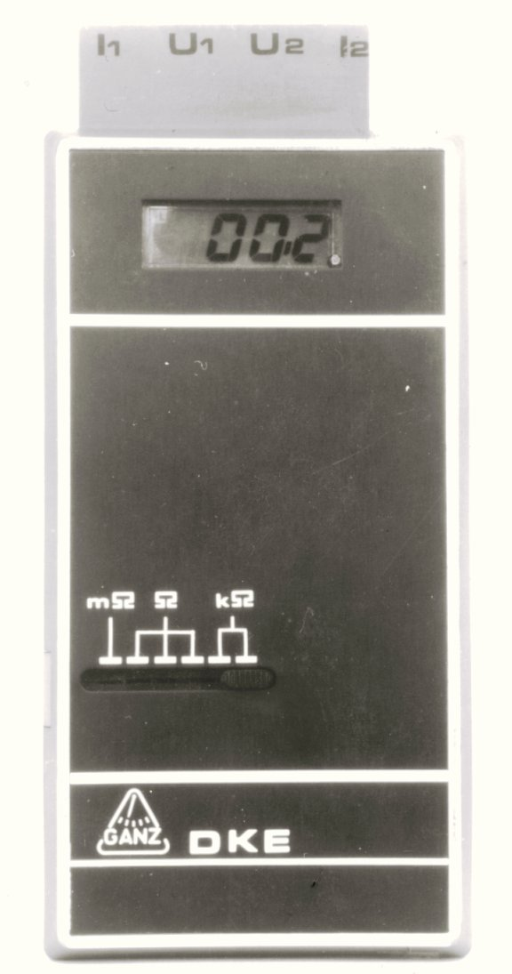 Digitális kézi ellenállásmérő. Négyvezetékes méréshez.